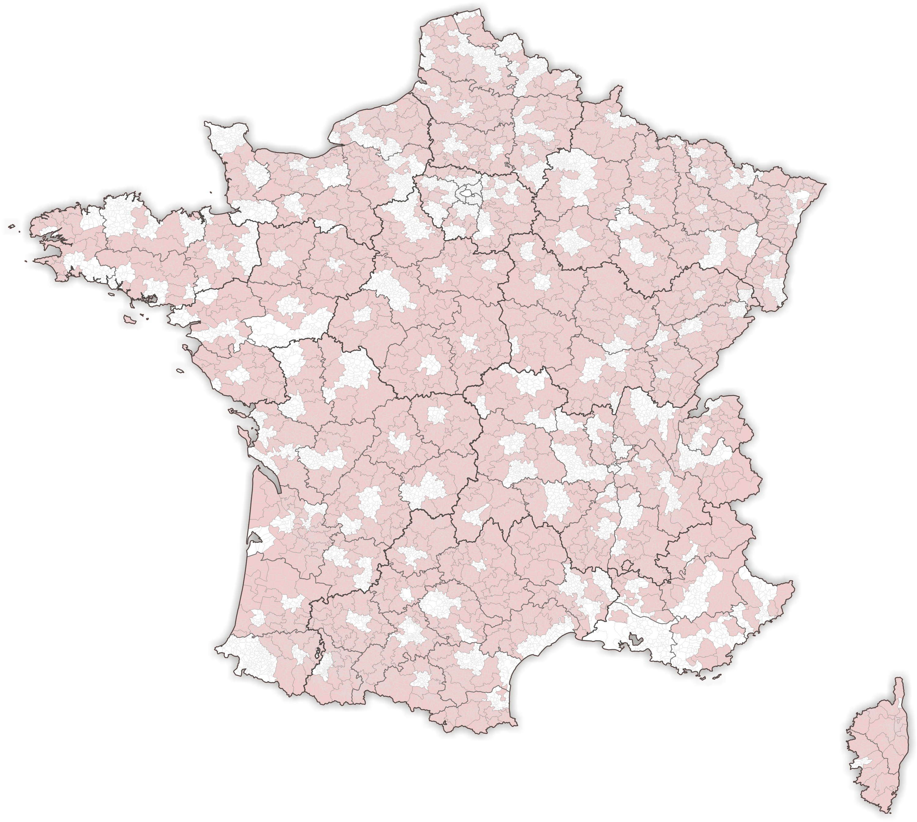 Communauté de communes in Frankreich